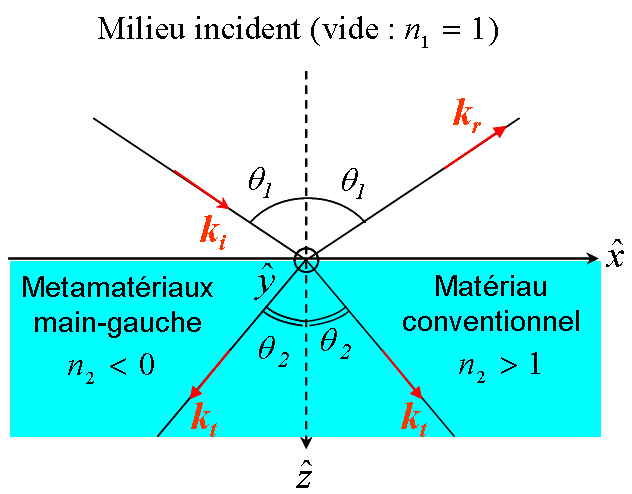 Différence entre une réfraction normale et une réfraction négative (Difference between a conventional refraction and a negative refraction)